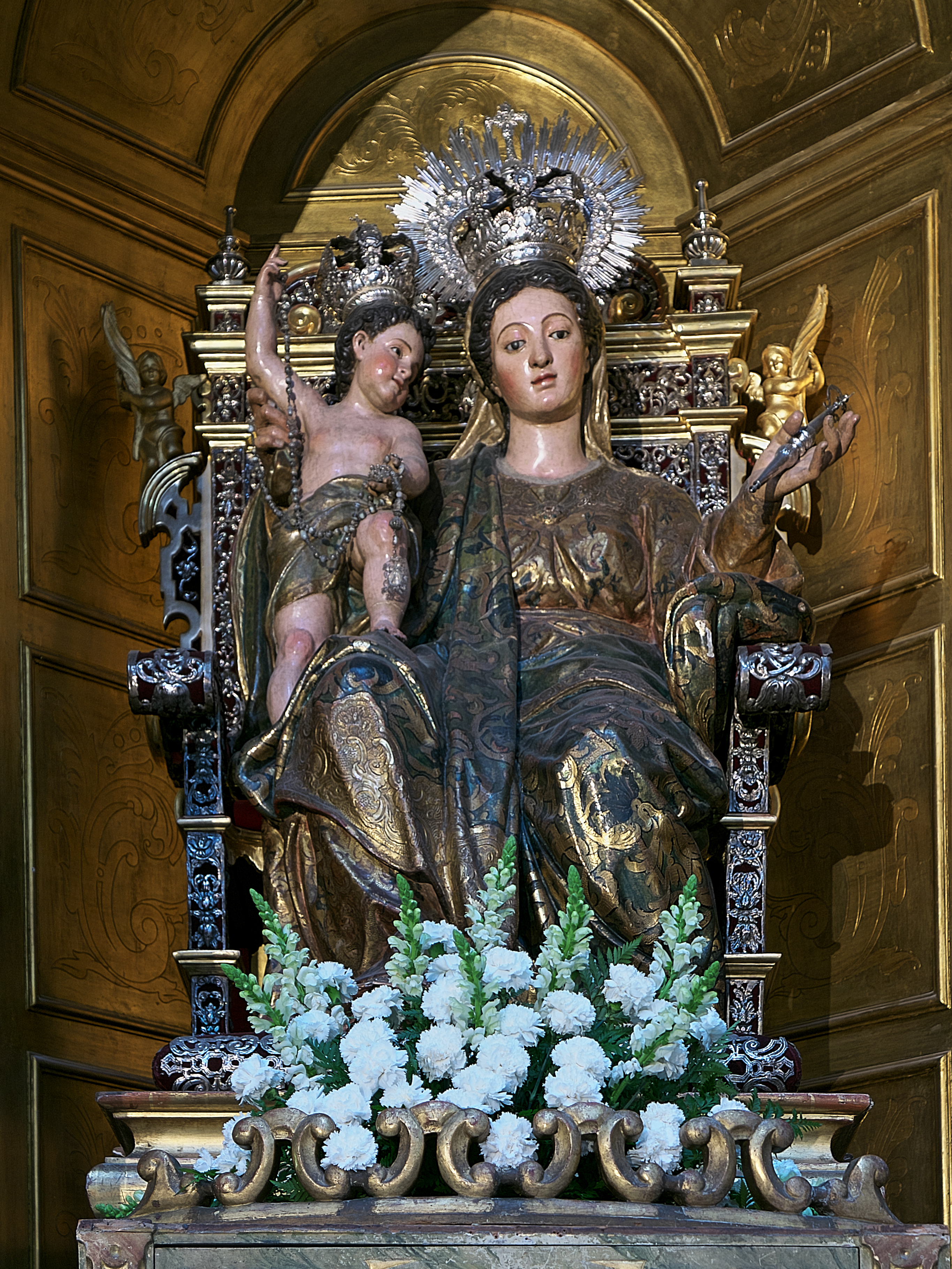 Iglesia de Santa Cruz (Sevilla). Imagen atribuida a Jerónimo Hernández de Estrada (ca. 1578). Procedente del desaparecido Convento de San Pablo (Sevilla).